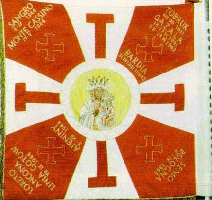 Sztandar 3 Dywizji Strzelców Karpackich (replika, lewa strona)